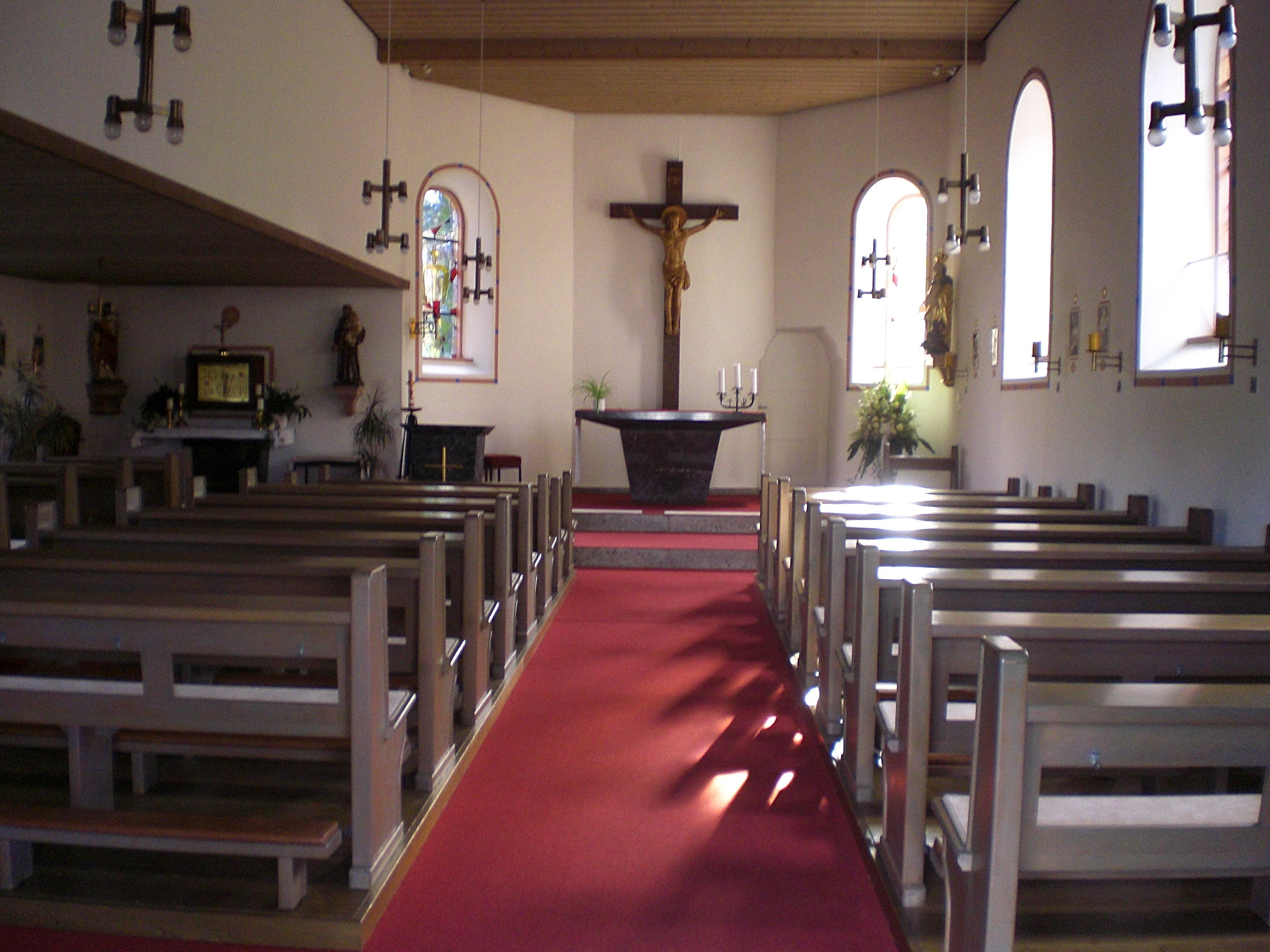 Mariä Geburt, Innen Altar